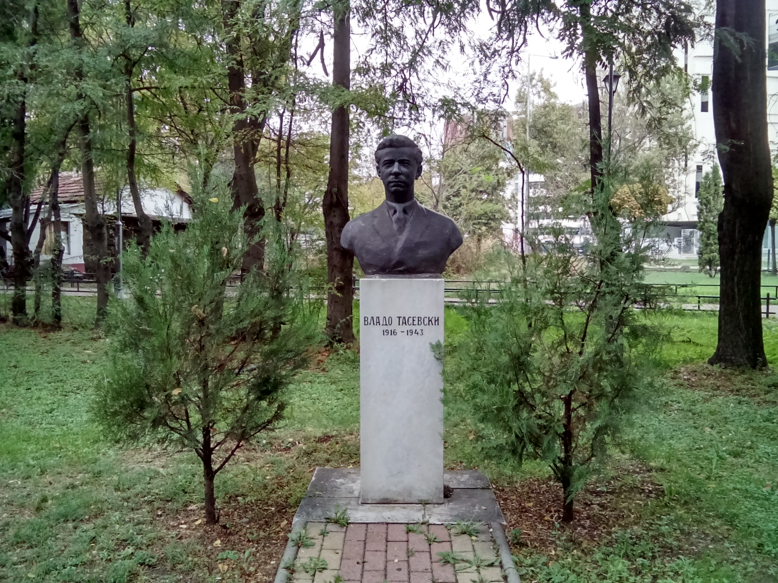 Bust of Vlado Tasevski